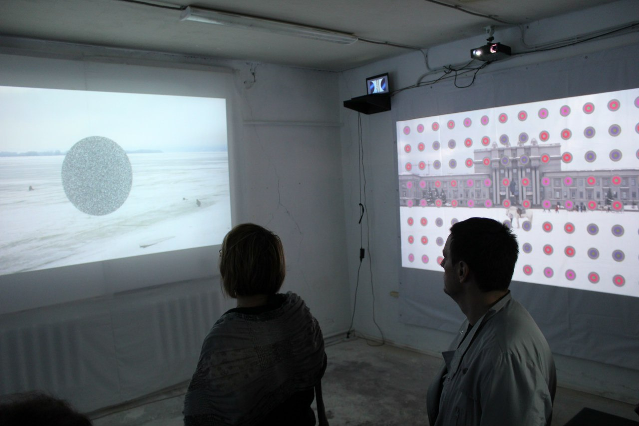 Владимир Логутов фестиваль пять способов выйти на свободу Самарский литературный музей 2013